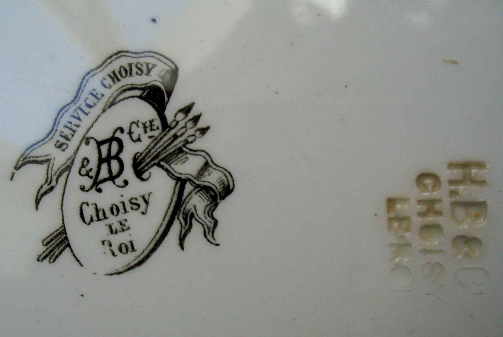 Marque en creux et tampon imprimé de HB (Hipolyte Boulenger) Choisy-le-Roi, fin XIXe siècle, France